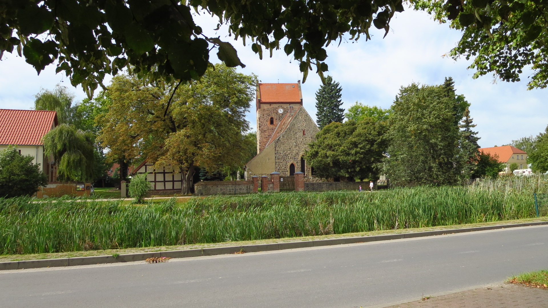 Blumberger Kirche, Nr. 8 in der Liste der Baudenkmale in Blumberg bei Ahrensfelde